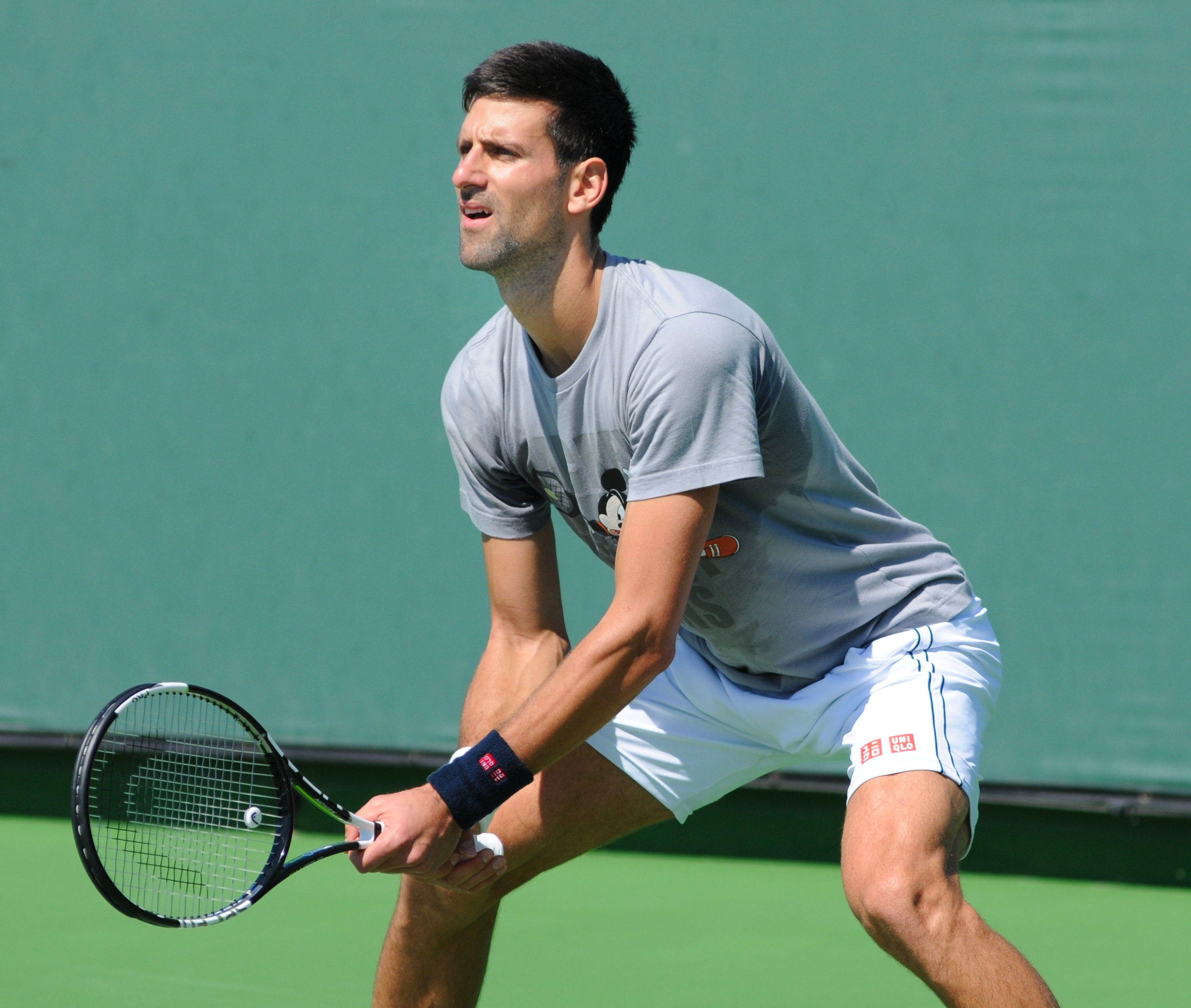 Novak Djokovic